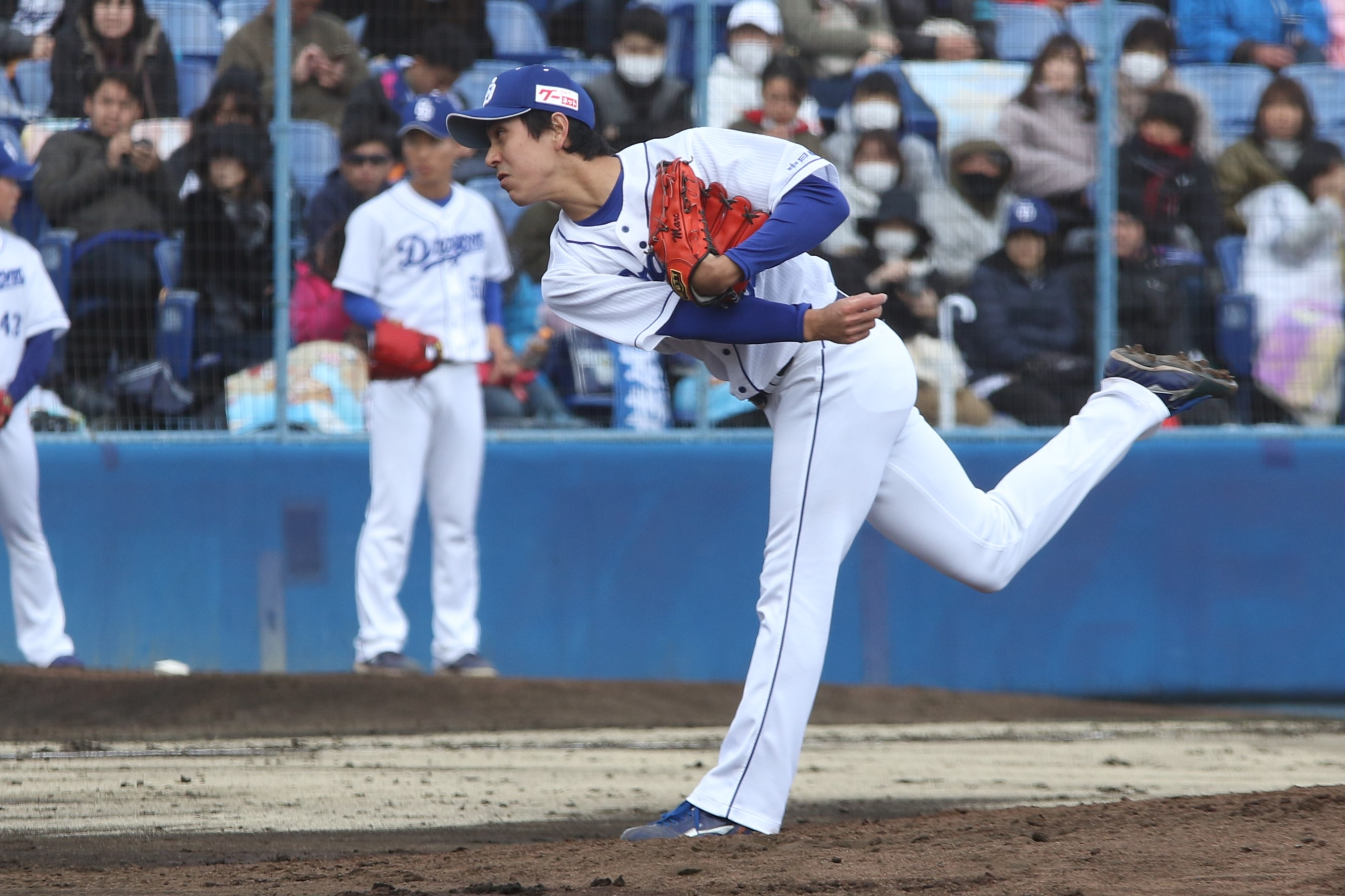 中日ドラゴンズ時代 （2019年3月17日、ナゴヤ球場にて）